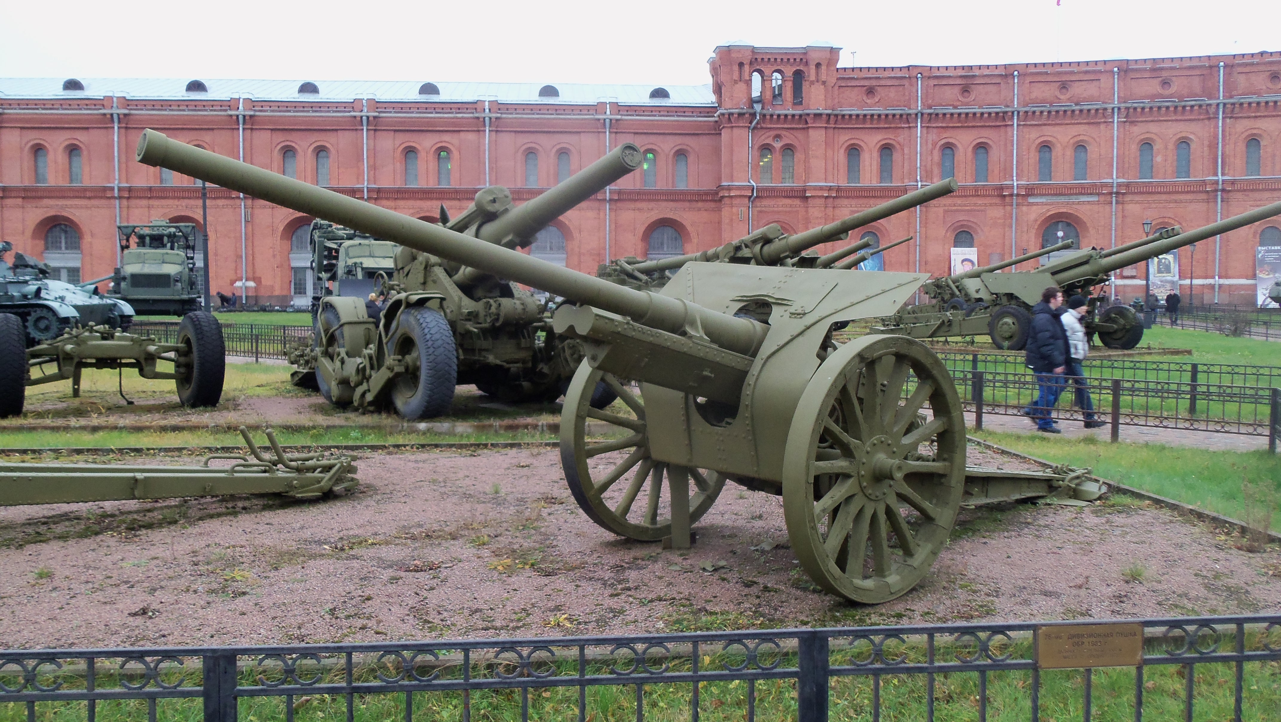 76-мм дивизионная пушка образца 1933 года в Военно-историческом музее артиллерии и пр. в Санкт-Петербурге